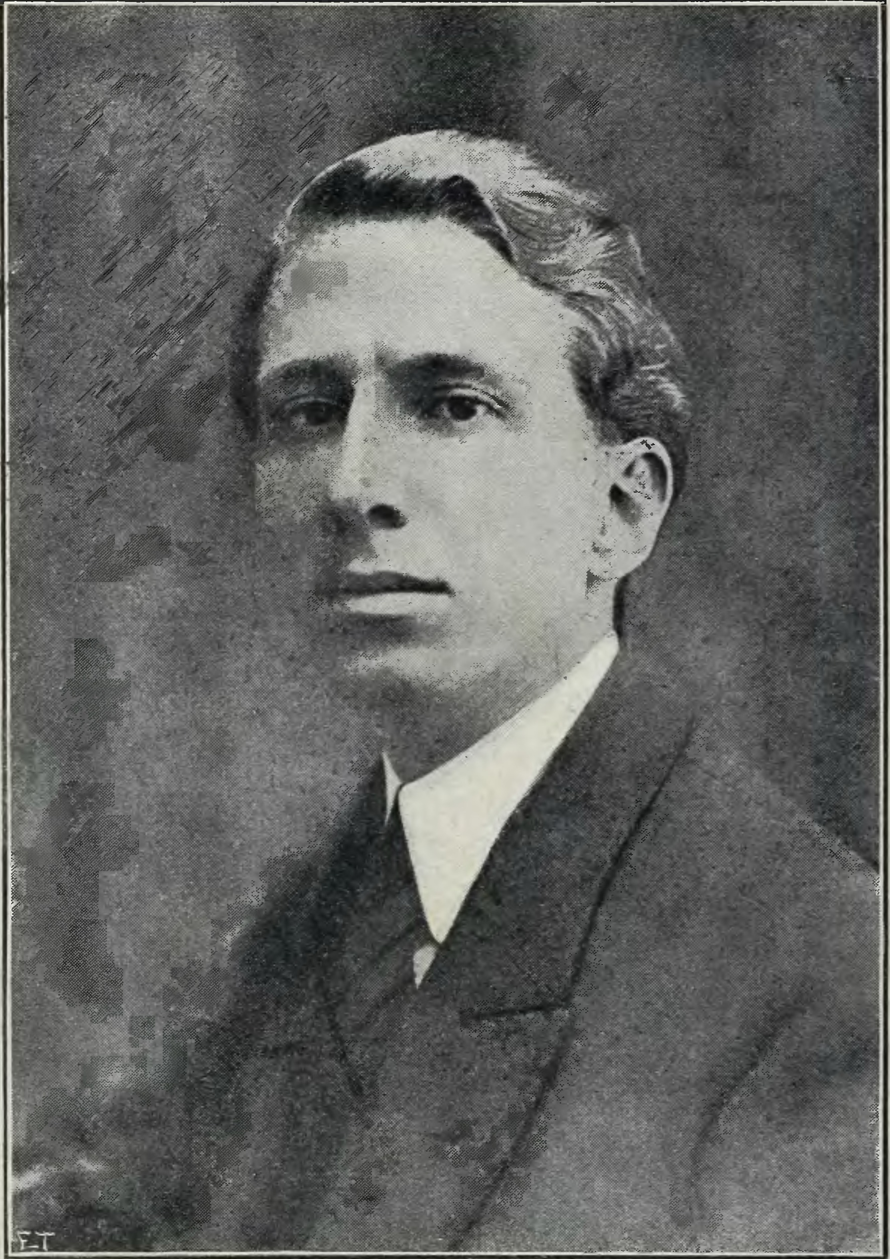 Verso la cuna del mondo, racconti di un viaggio in India di Guido Gozzano, Treves, Milano 1917